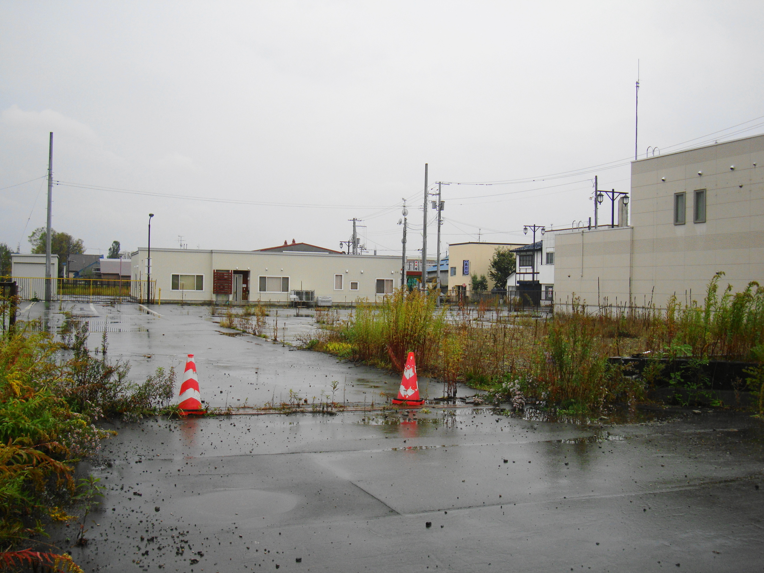 Bibai depot